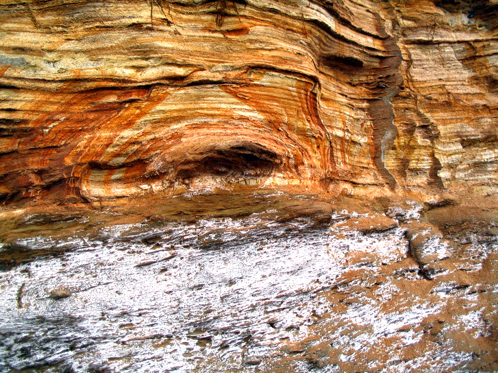 Anneaux de Liesegang, oxyde de fer dans la paroi rocheuse de Pénestin, Bretagne FR. Le blanc que vous voyez sous les anneaux est du kaolin, la paroi est très altérée par endroit.